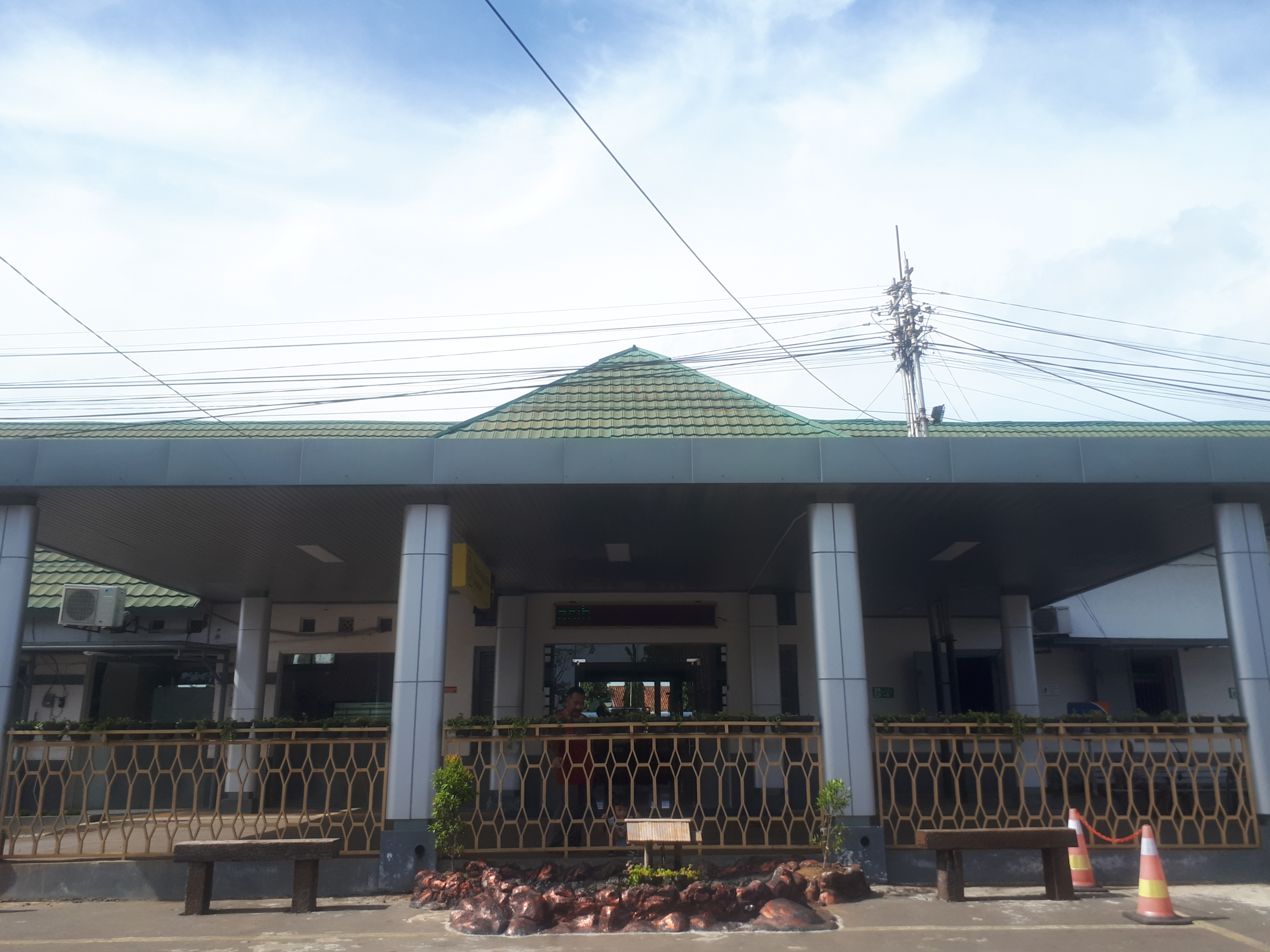 Tampak depan Stasiun Kroya tahun 2020